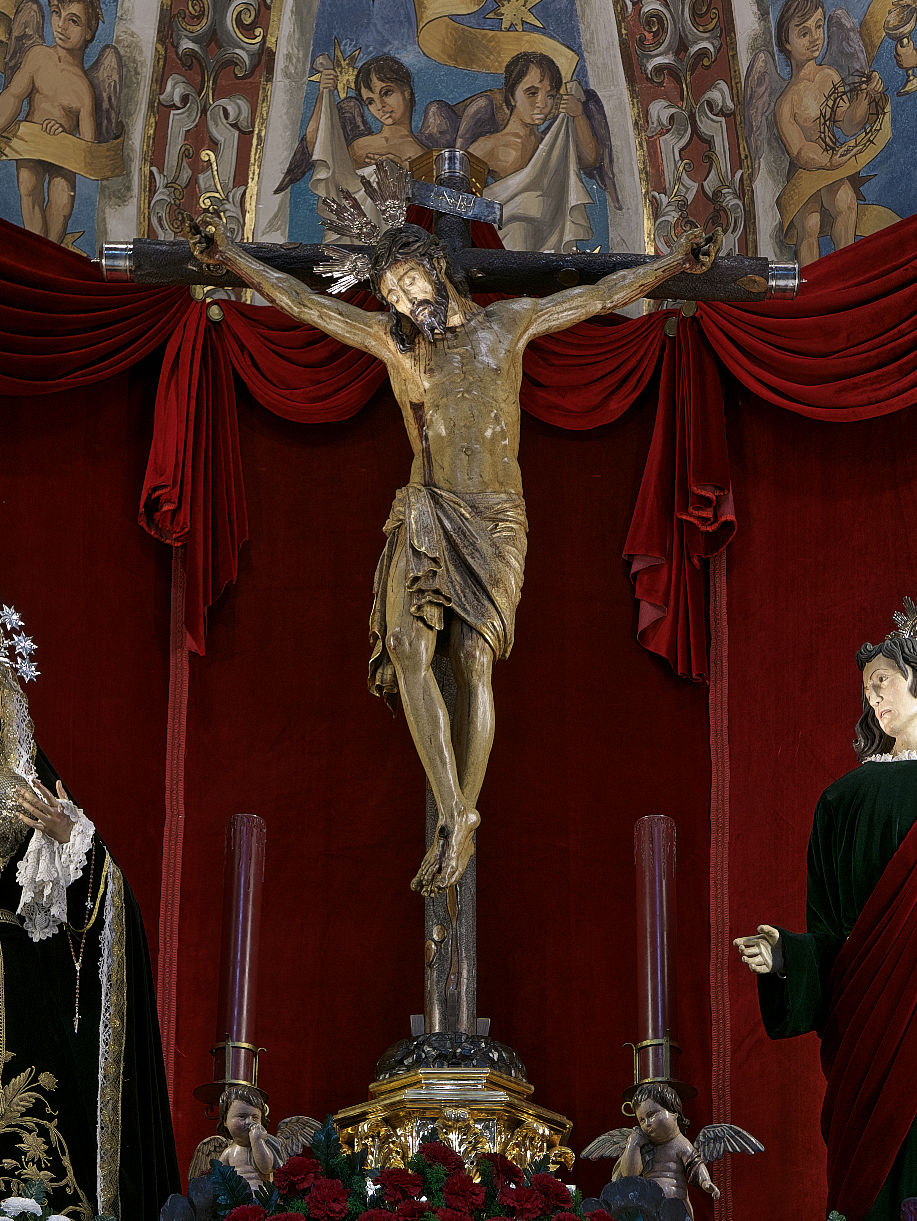 Iglesia de Santa Cruz (Écija). Imagen concertada (1567) con Gaspar del Águila por los agustinos del Convento de San Agustín (Écija).